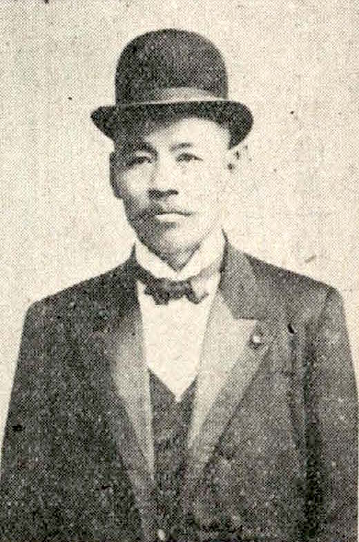 Bân-lâm-gú: 吳汝祥 NGÔ͘ Lú-siông